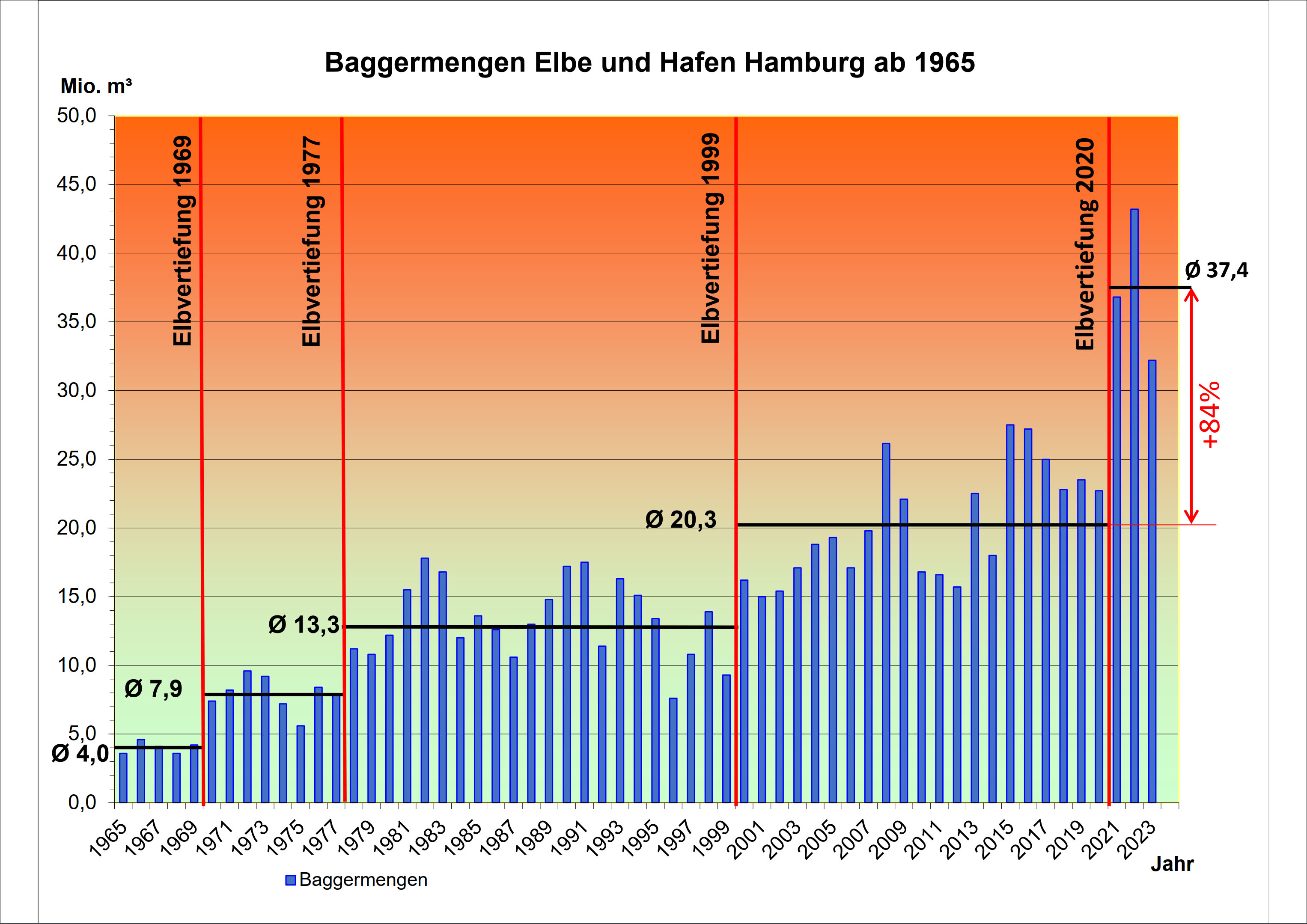 Unterhaltungsbaggerungen auf der Unterelbe seit 1965